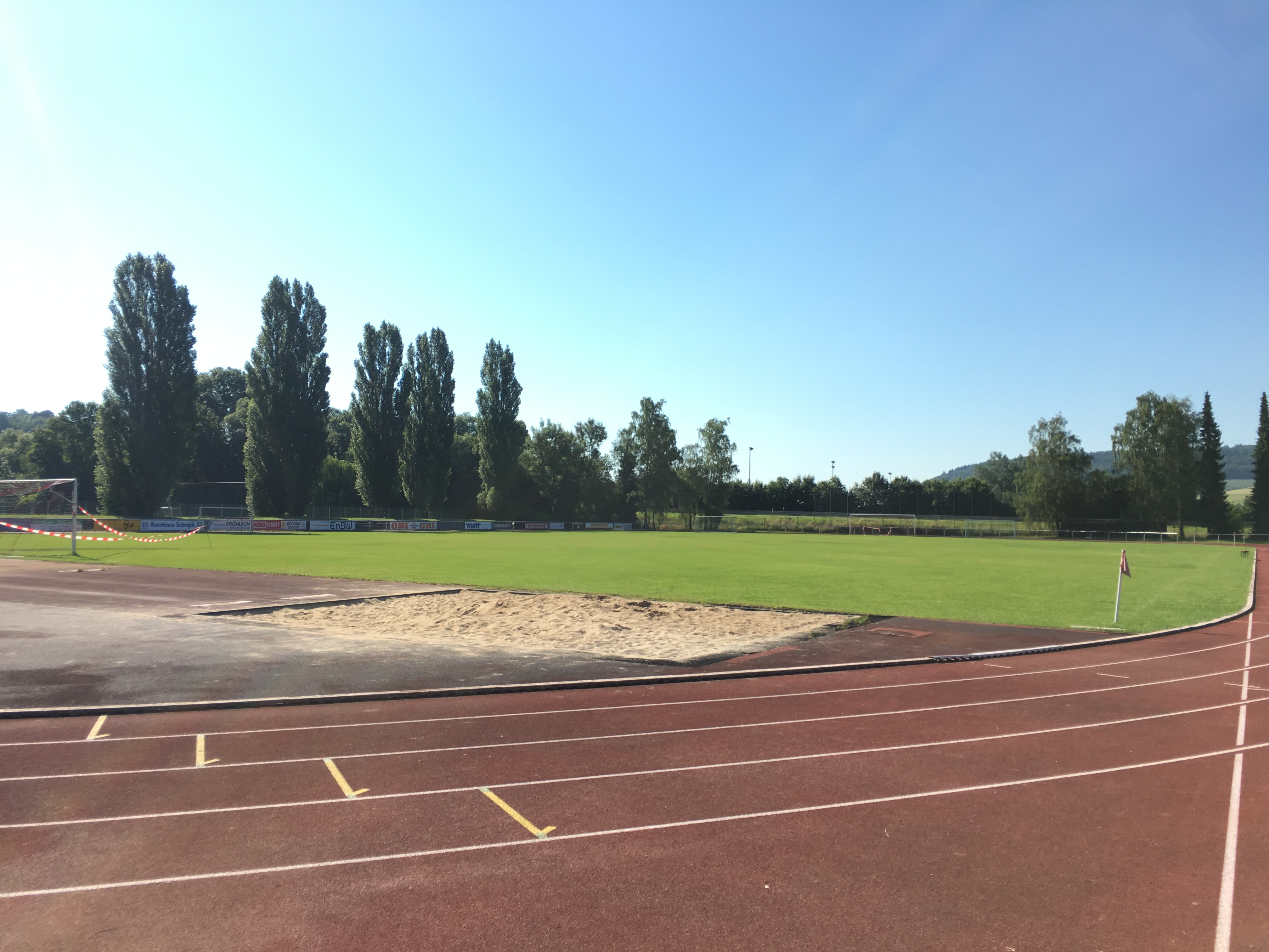 Platz - Ansicht Sandgrube